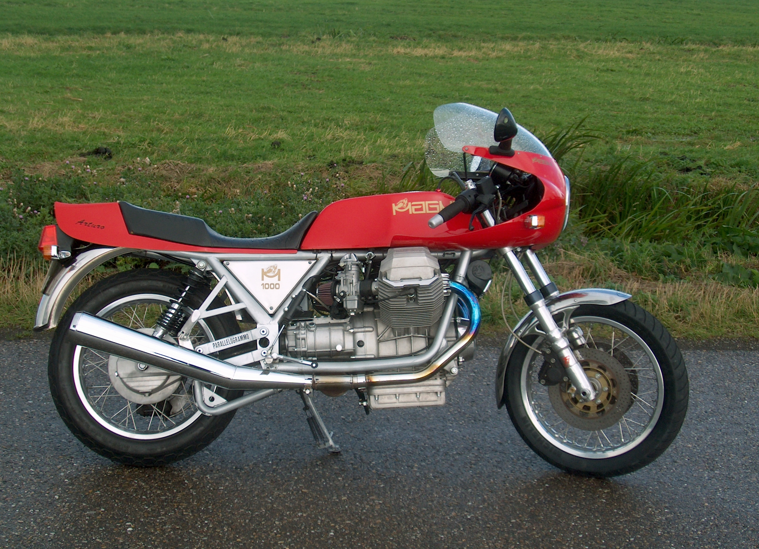 Eigen afbeelding